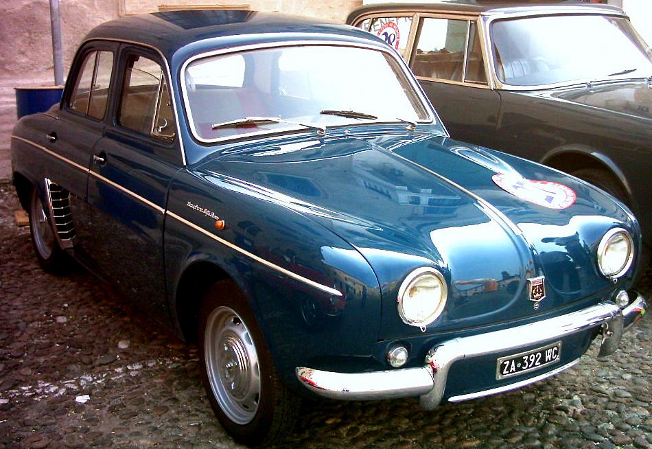 Renault Dauphine Alfa Romeo del 1964, fotografata al Raduno Auto Storiche di Medole nel 2010